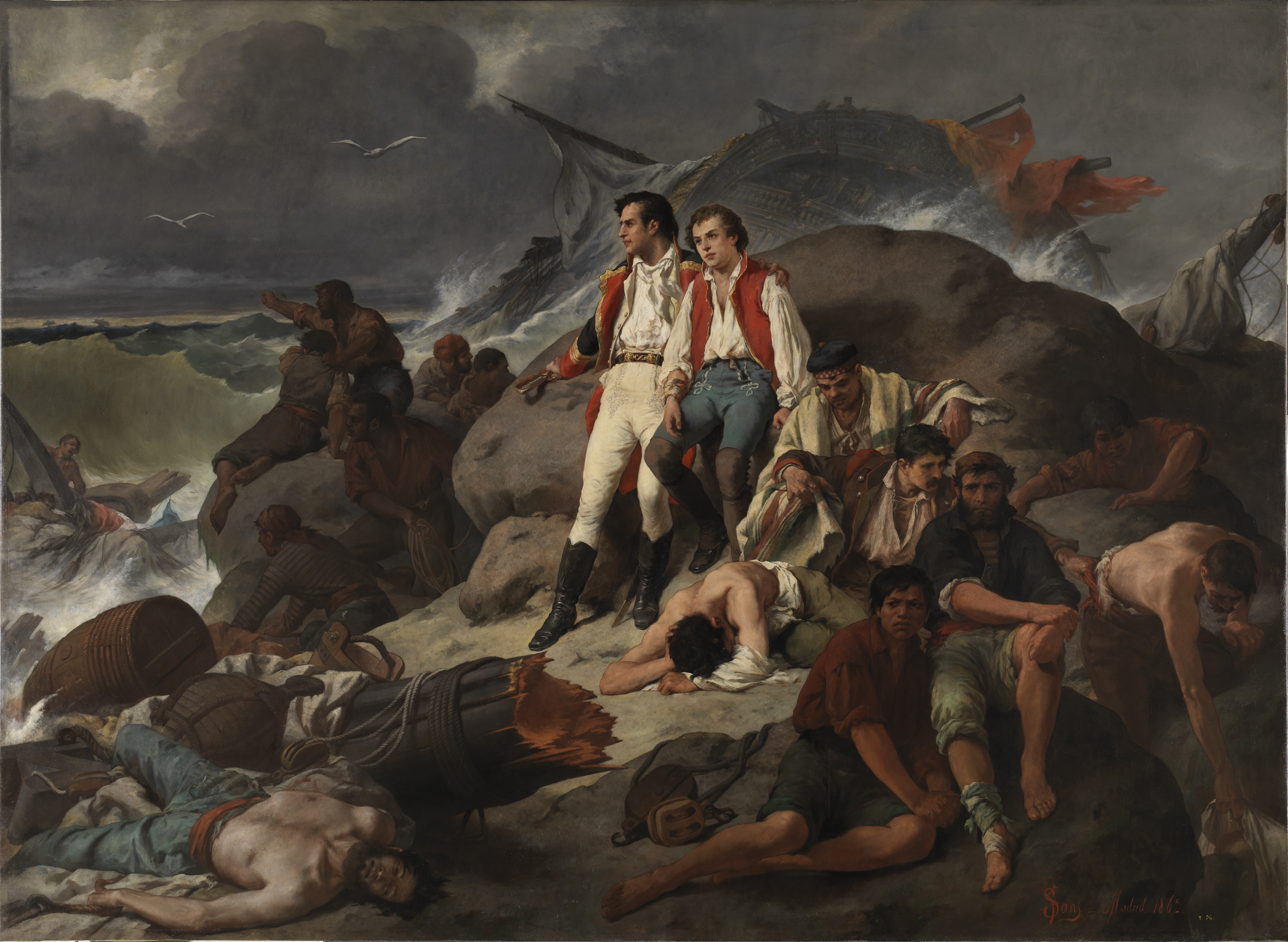 El lienzo representa el momento en que los supervivientes del navío español Neptuno, que tras la batalla de Trafalgar se estrelló y hundió en las inmediaciones del castillo de Santa Catalina de El Puerto de Santa María, se refugiaron en las proximidades de dicha Fortaleza.